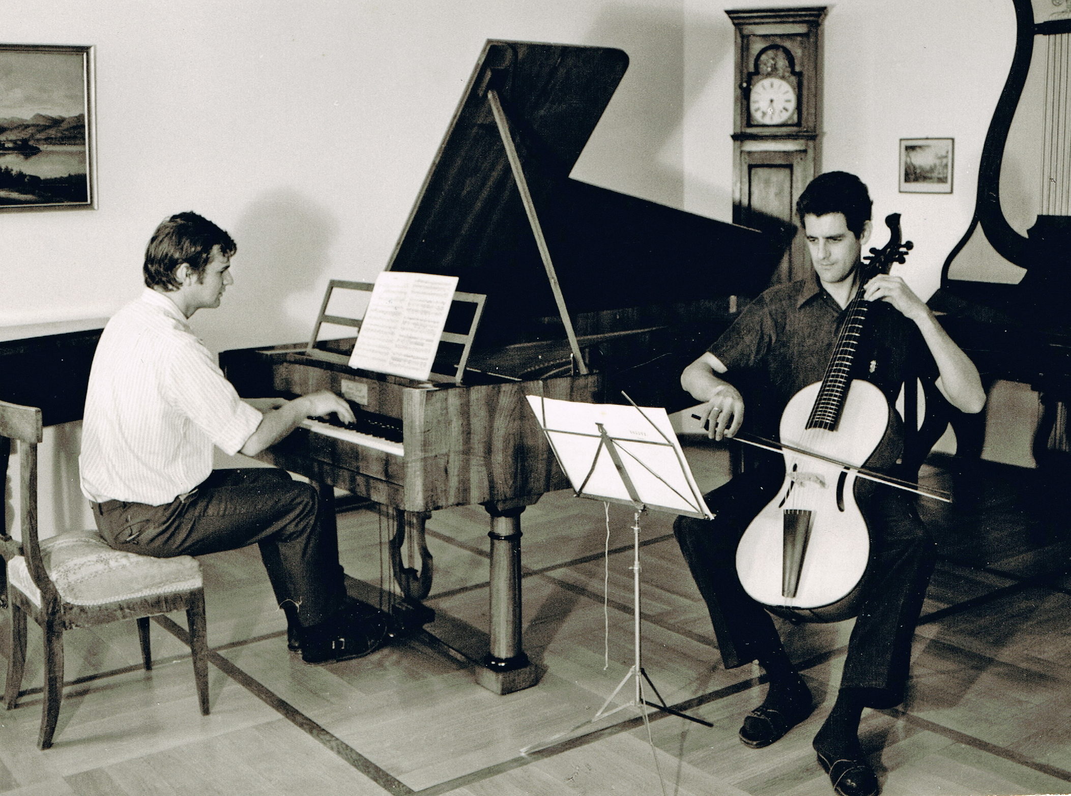 Alfred Lessing, Rolf Junghanns, Konzert bei Fritz Neumeyer in in Wasenweiler 17.10.1971